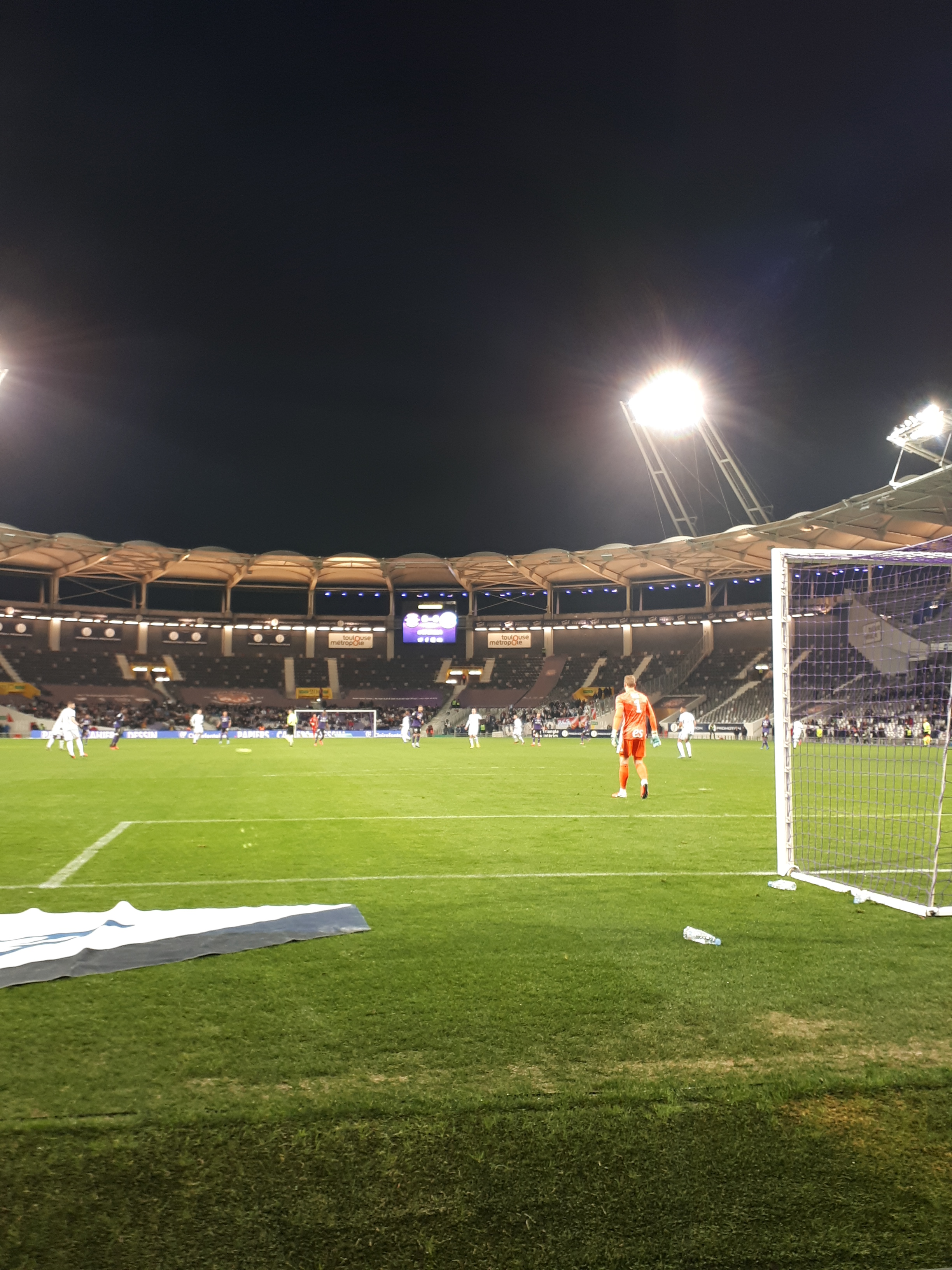 Matz Sels lors du match Toulouse FC - RC Strasbourg du 5 février 2020.